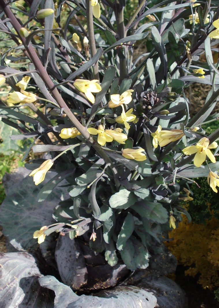 Brassica_oleracea_convar._capitata_var._rubra_L._-_Red_cabbage_-_flowers